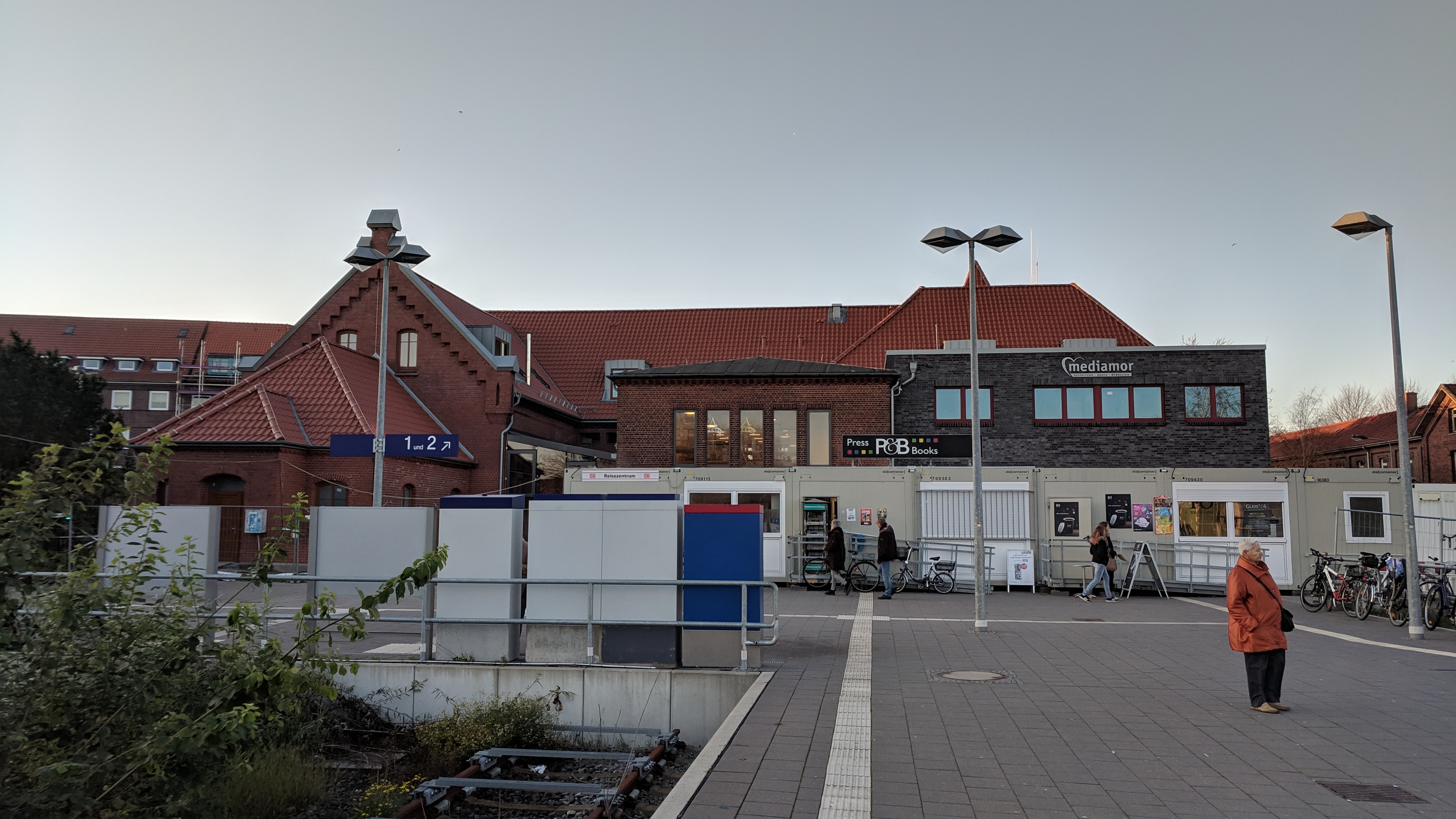 Während der Umbauarbeiten des Bahnhofsgebäudes in Cuxhaven sind das Reisezentrum sowie zwei Läden in Containern untergebracht.